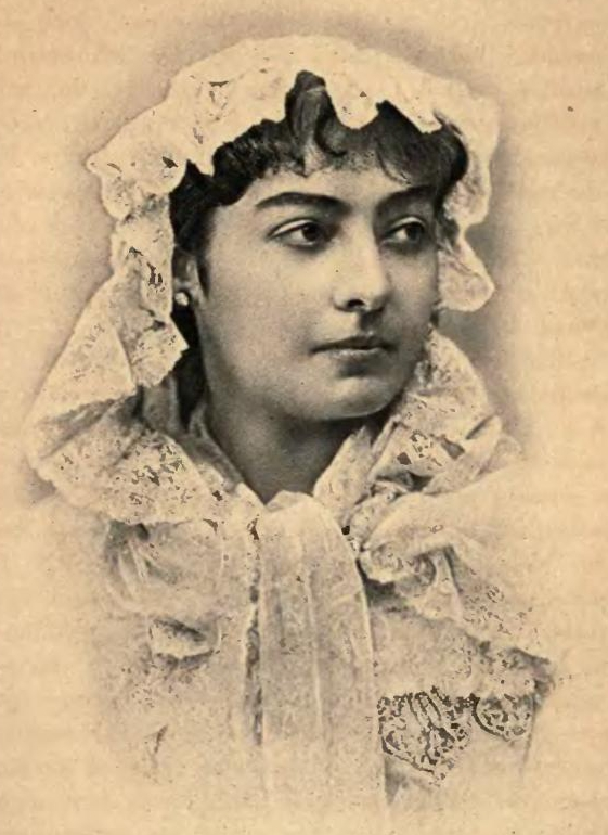 La reina Natalia de Serbia antes de 1917.